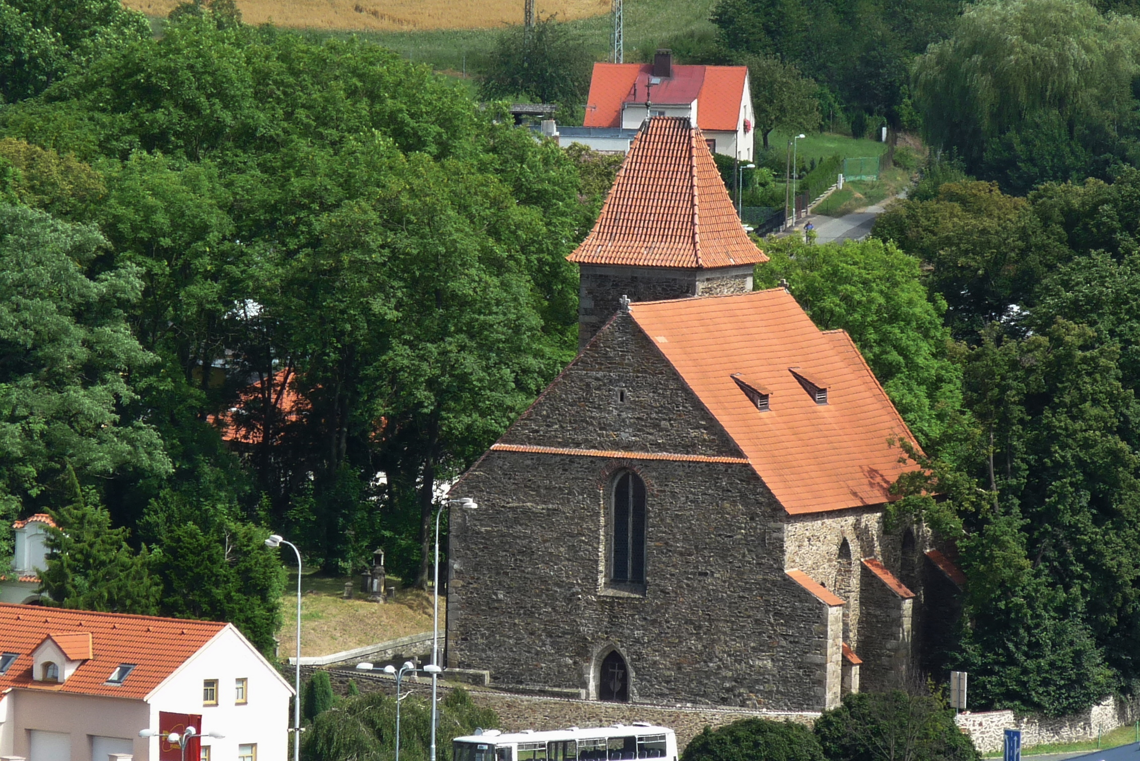 Kostel U Svatých, Domažlice